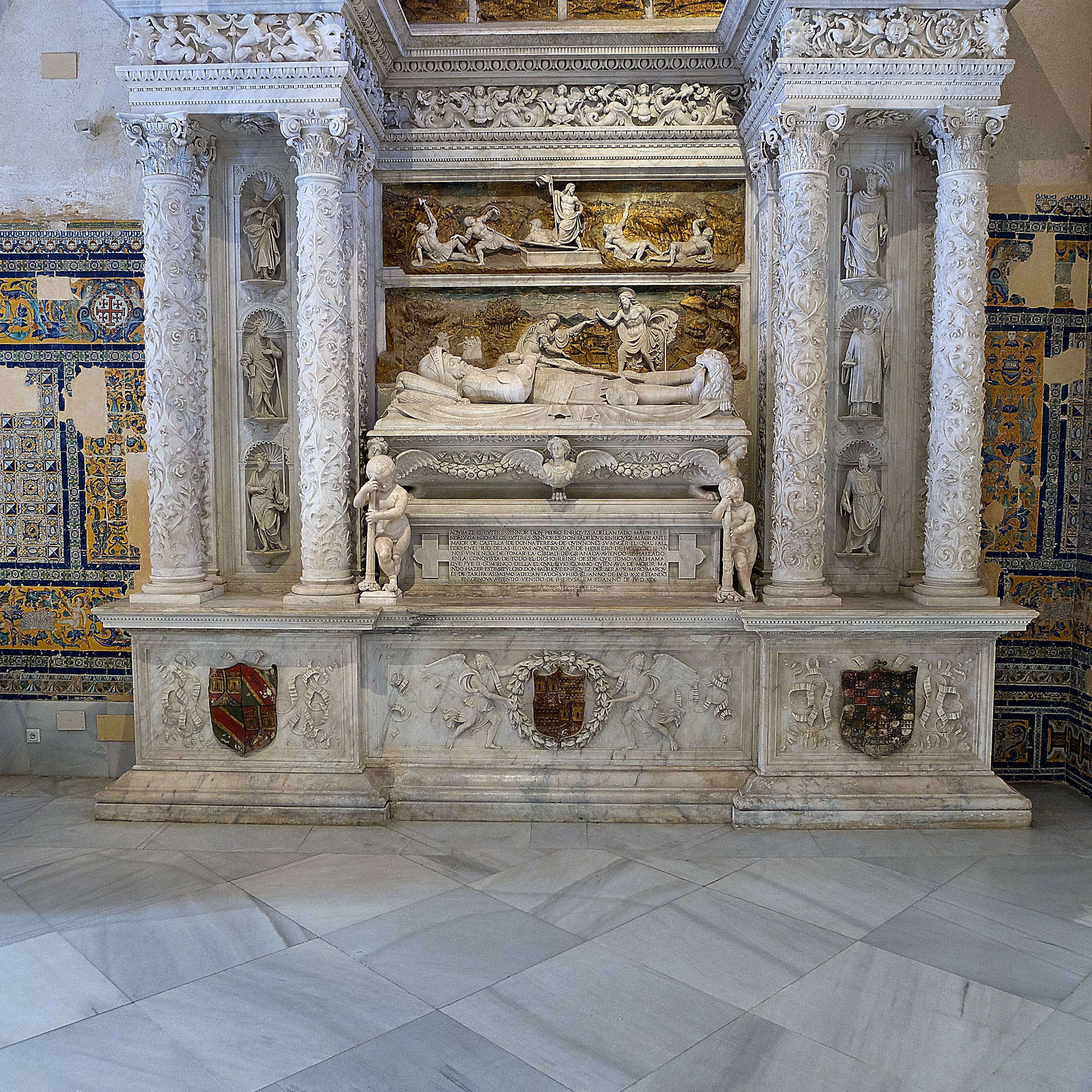 Fadrique Enríquez de Ribera, primer Marqués de Tarifa, contrata a Antonio María Aprile de Carona y a Pace Gagini (Gazini o Gaggini), las sepulturas para sus padres (1520). El arte renacentista, el mármol de Génova, en la ciudad mudéjar de Sevilla. (La distancia de enfoque no permite captar el arco de triunfo)